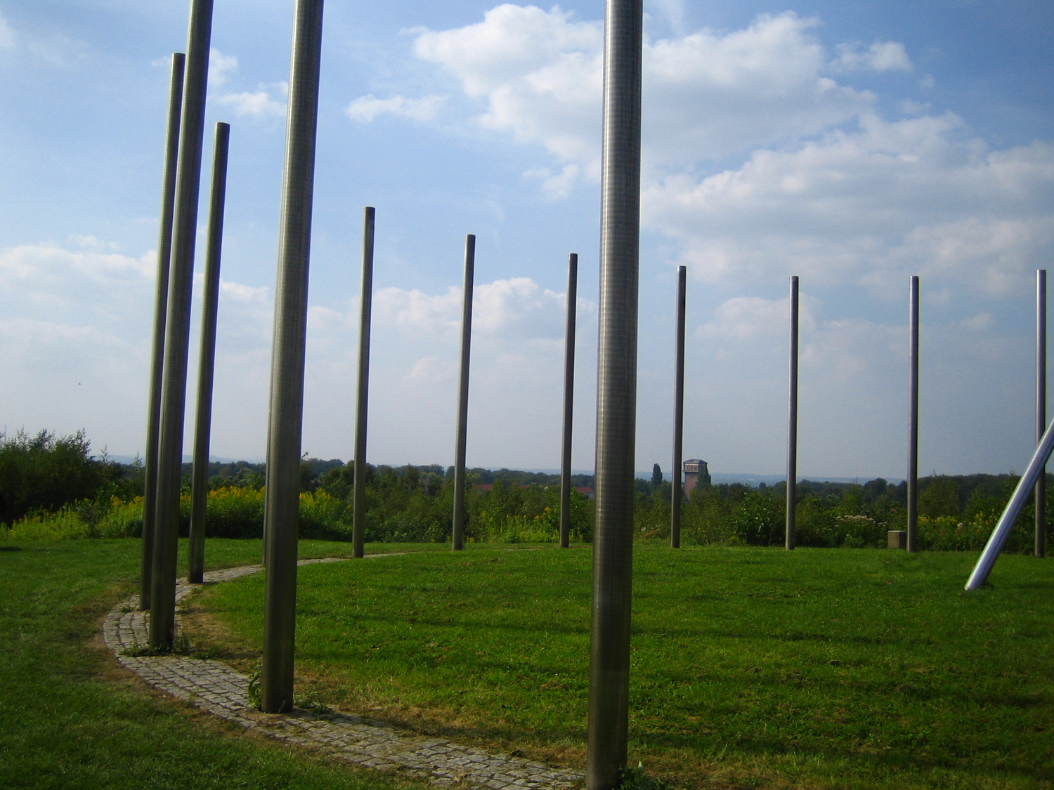 Sonnenuhr Schweriner Halde in Castrop-Rauxel